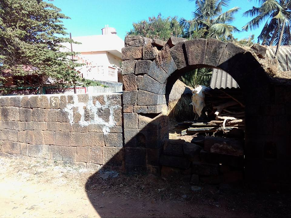 మఠం తాలూకు రాతి ఆర్చ్ నిర్మాణం